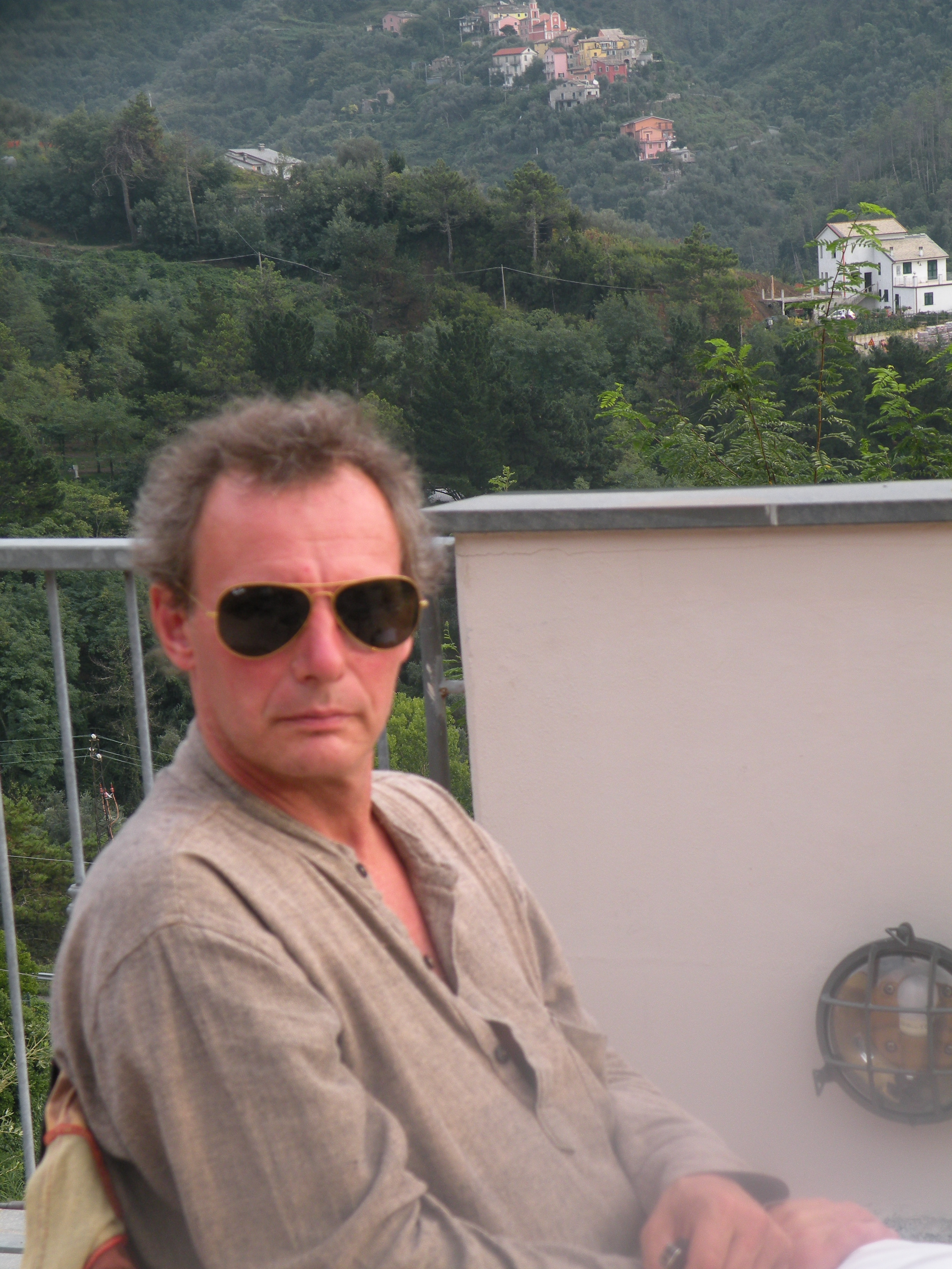 Alain Nitchaeff